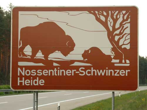 Touristisches Hinweisschild an der A19 mit dem Hinweis auf Nossentiner-Schwinzer Heide